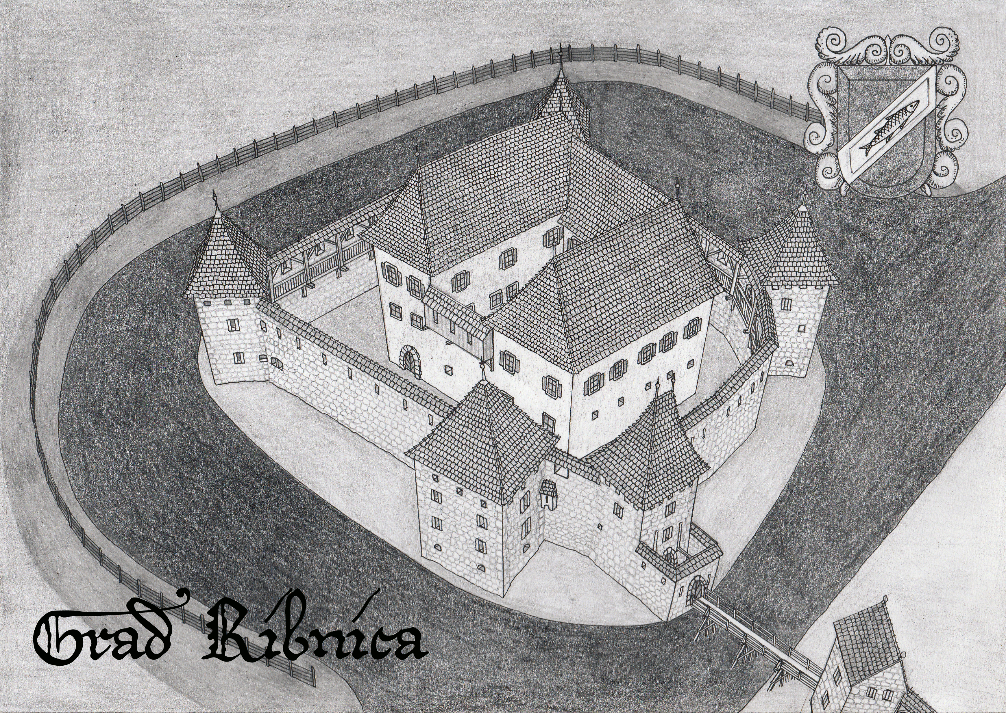 Poskus rekonstrukcije gradu Ribnica iz leta 1537. Delano na podlagi skicne osnove, tlorisa univ. dipl. inž. arh Igorja Sapača, skice in topografije Janeza Vajkarda Valvasorja (1679), oljne slike Hansa Georga Geigerja von Geigerfelda (1641), oljne slike Matevža Langusa 1833, franciscejskem katastru za Kranjsko,1823-1869, 3D lidarskih posnetkov, predvojnih razglednic in terenskih fotografij. Zgoraj desno je mestni grb izrisan na podlagi podobe iz Velike grbovne knjige, avtorja Janeza Vajkarda Valvasorja.